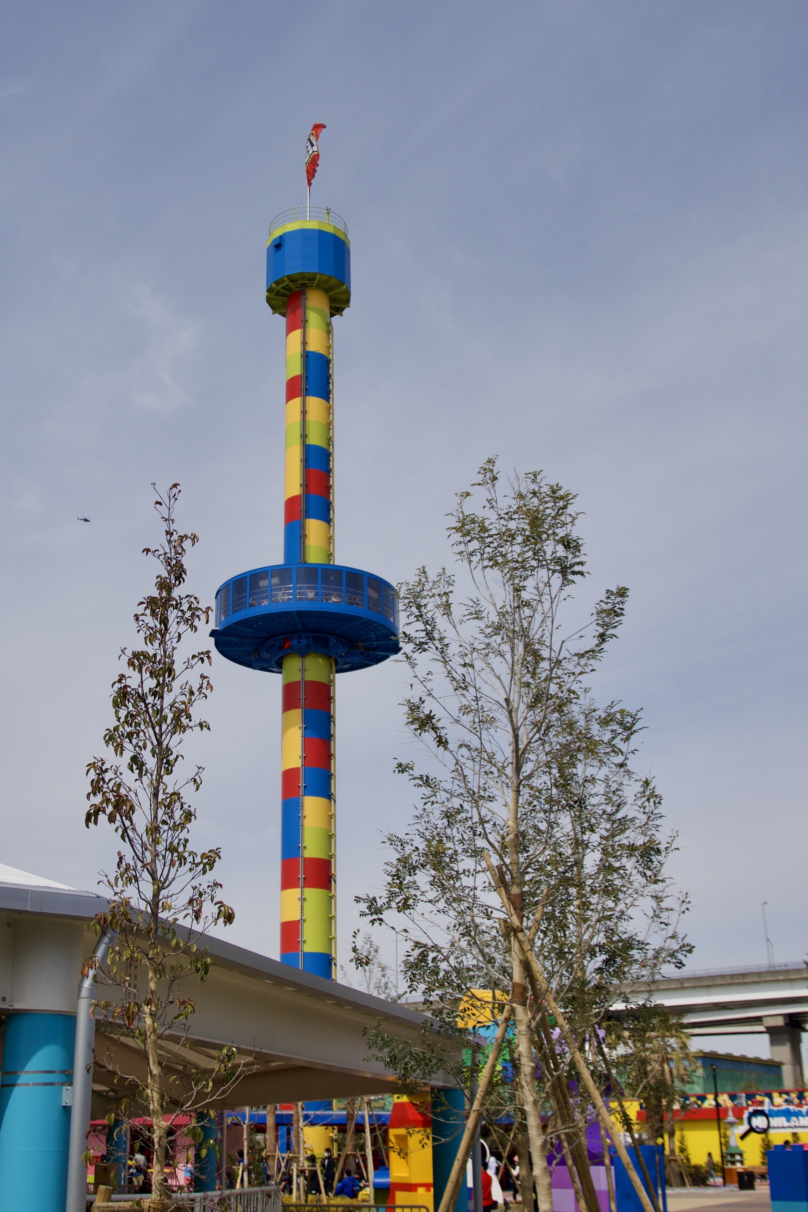 レゴランドジャパン オブザベーション・タワー